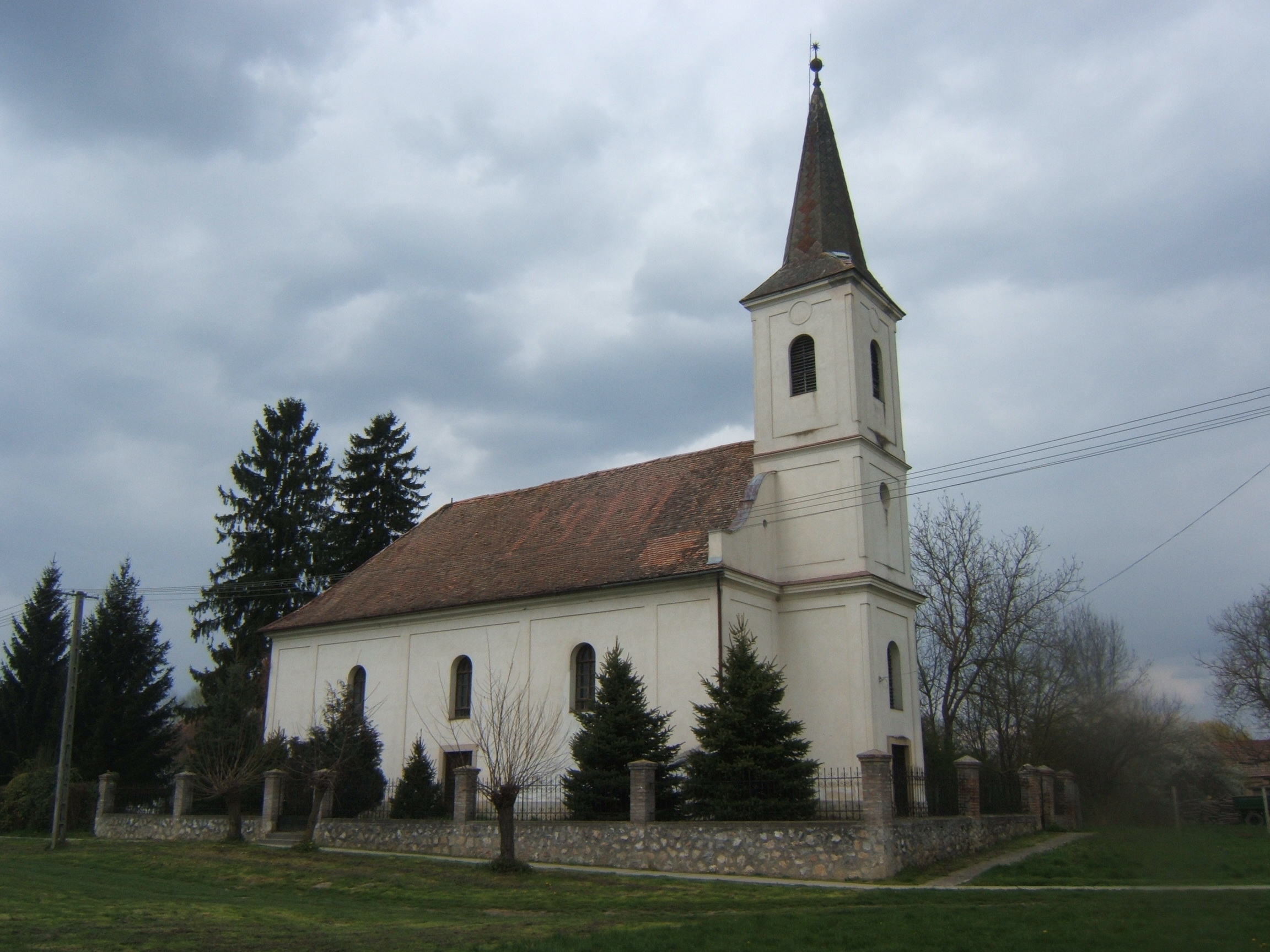 Zaláta, református templom